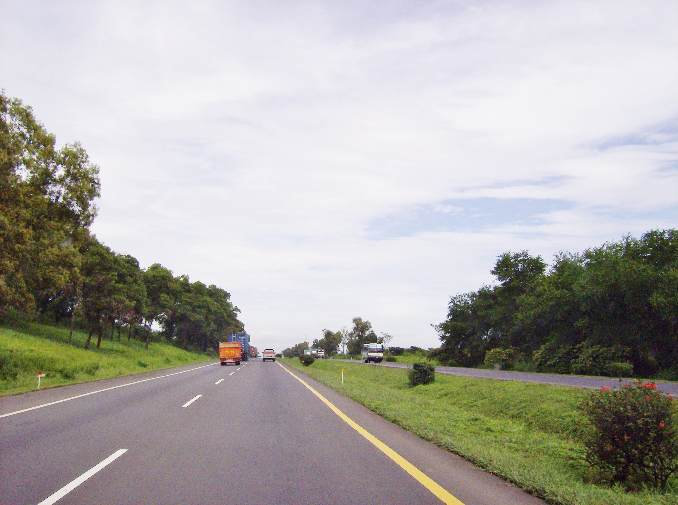 Made by Meursault2004 aka Revo Ark Giri Soekatno